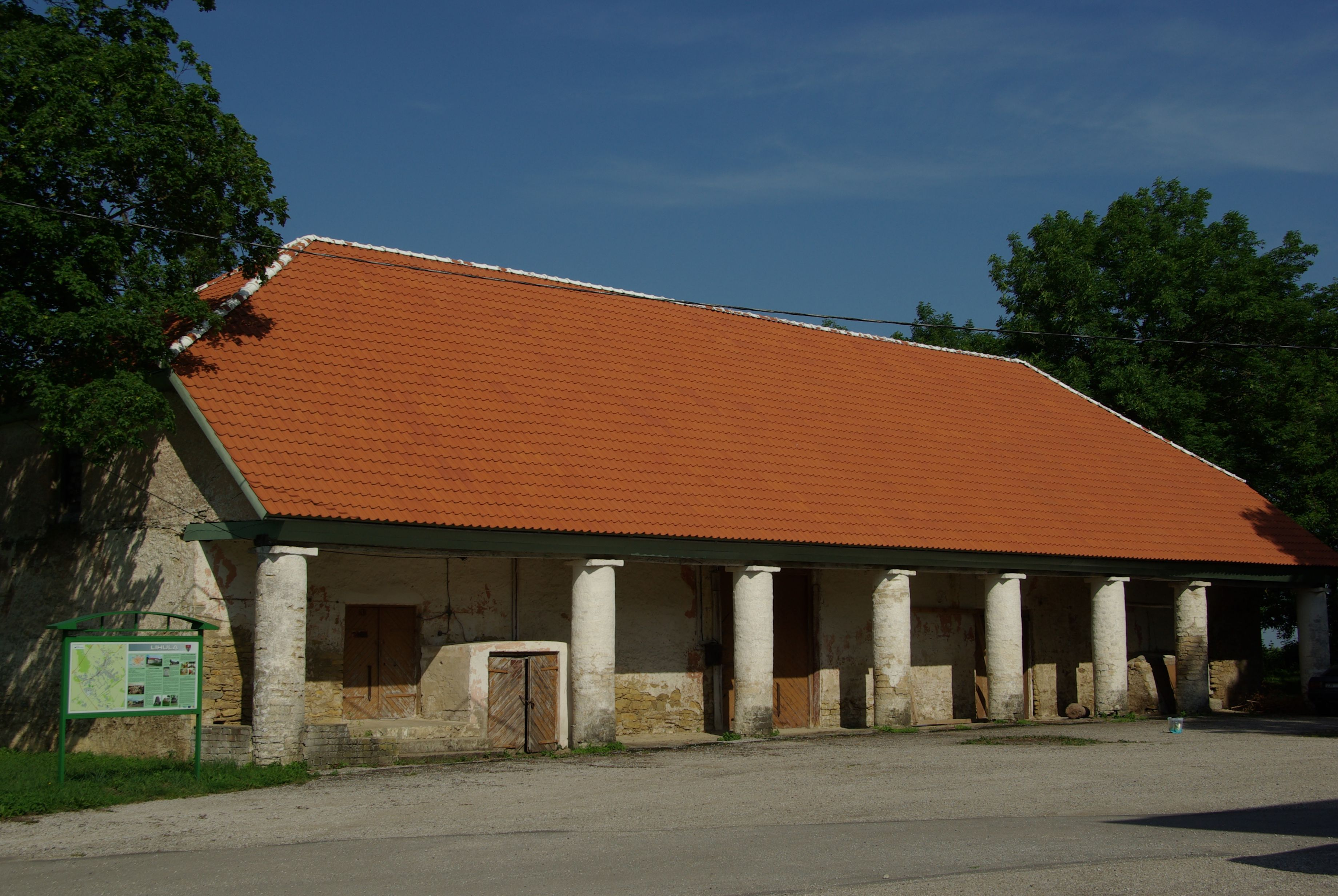 Lääne maakond, Lihula vald, Lihula linn